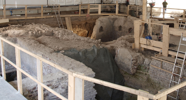 Die gotische Bimah